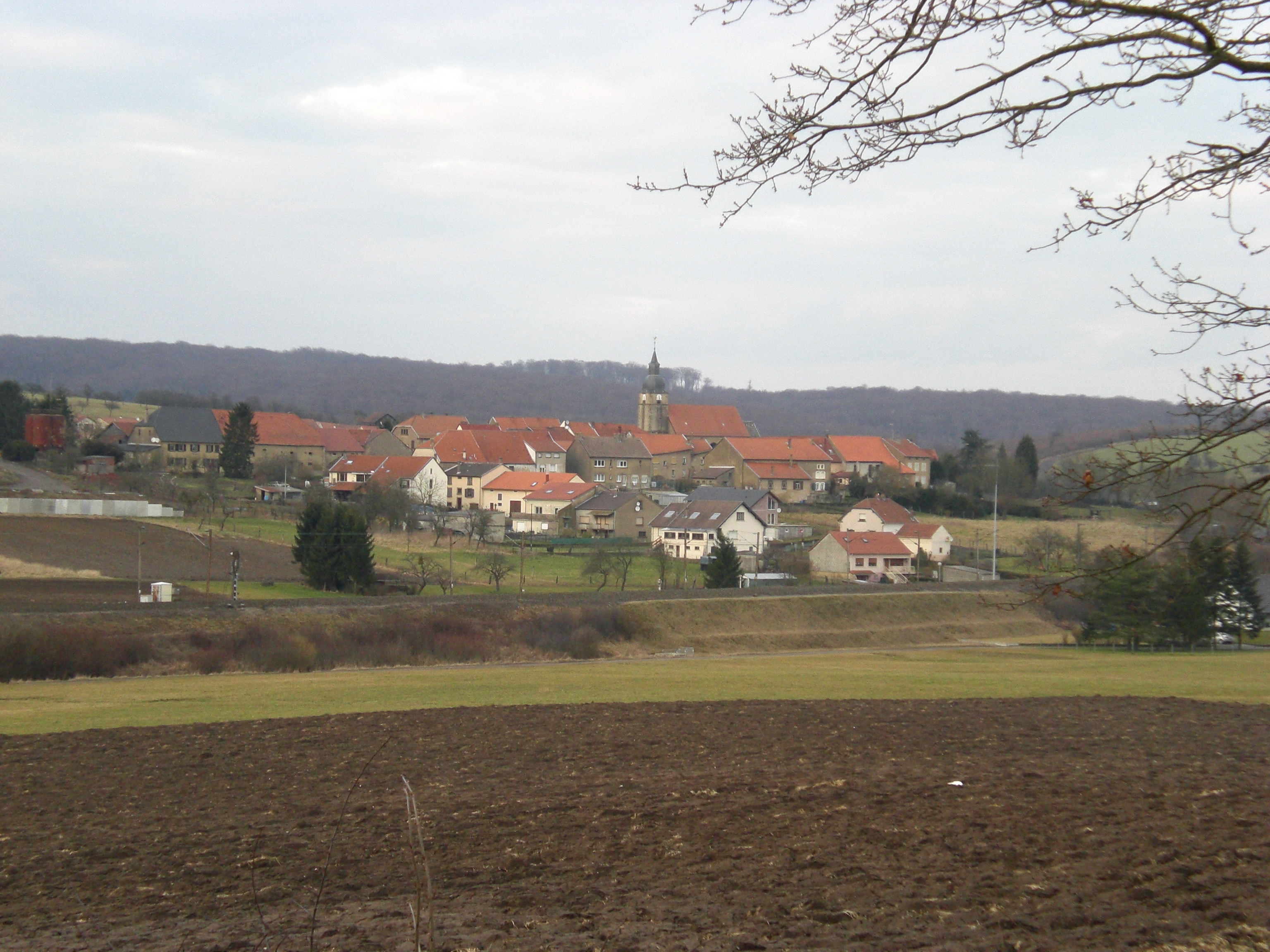 Ébersviller-la-Petite avec Ligne Rémilly-Sarrebruck au premier plan